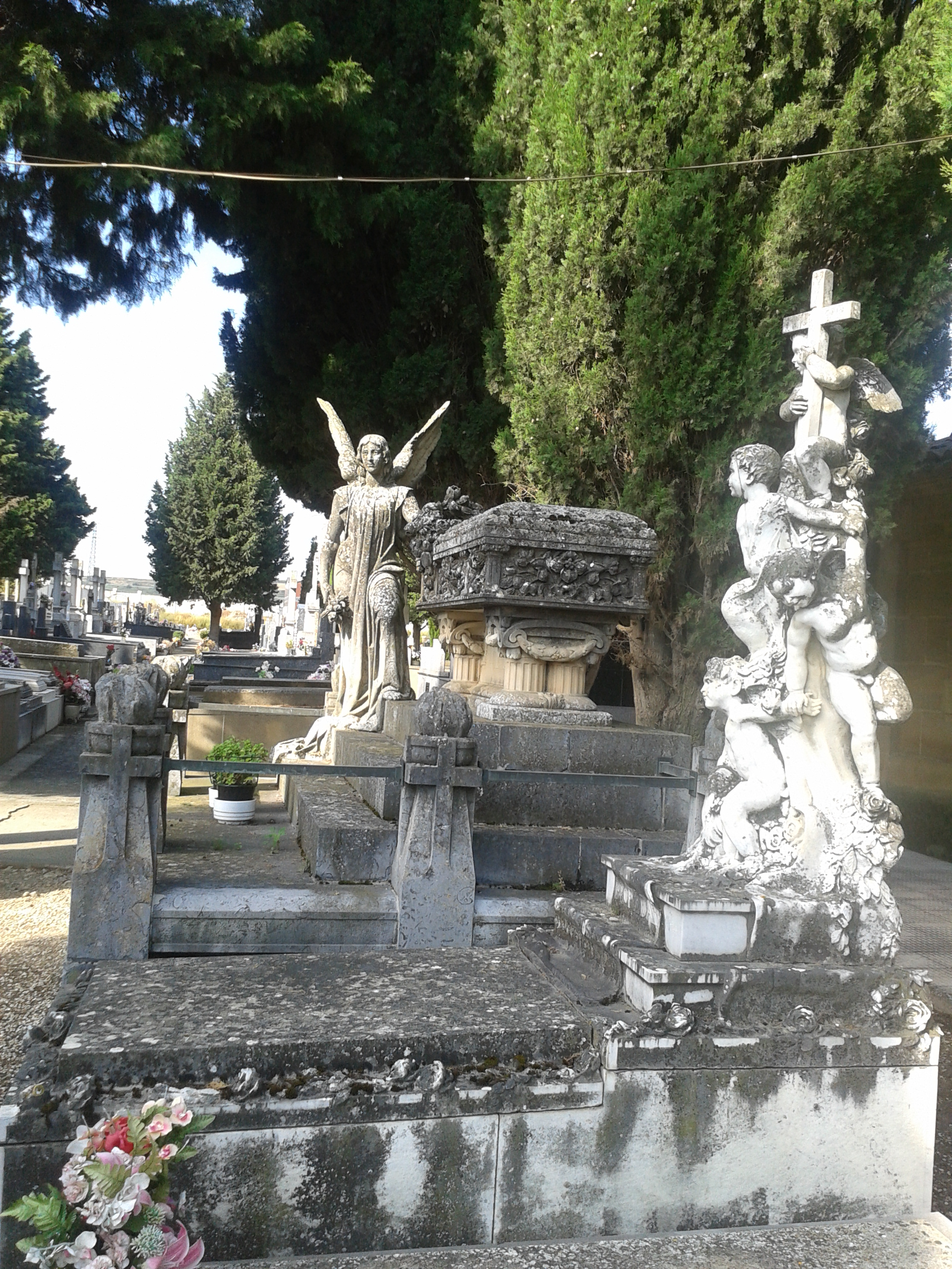 Panteón Familia Felipe Pérez y Tumba de Concepción Campo. Cementerio Municipal de Haro. Autor Manuel Anzuela